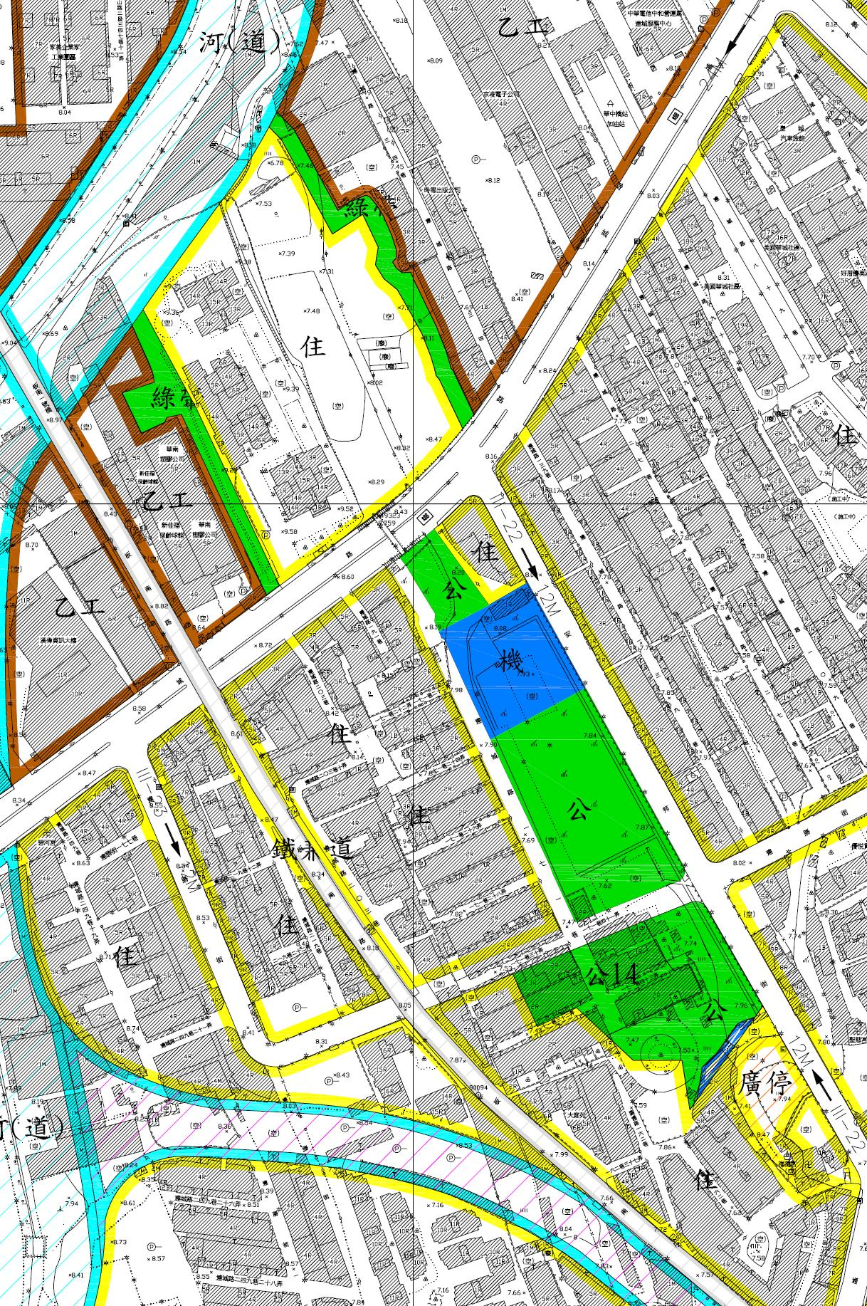 中文（台灣）: 新北市中和區公路二村公園和安邦公園地籍圖節錄。